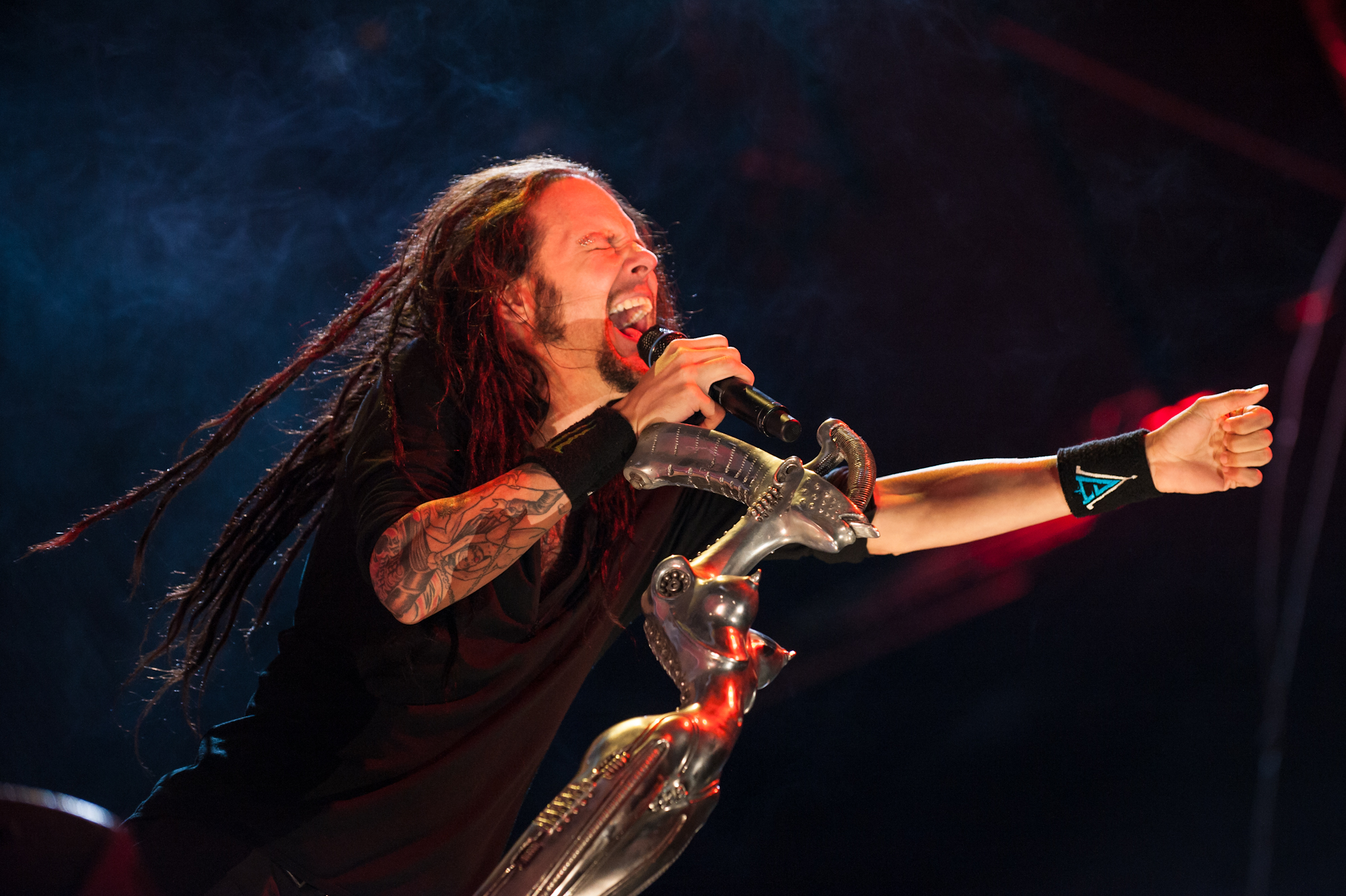 Jonathan Davis, Sänger von Korn beim Festival, Rocco del Schlacko 2012.